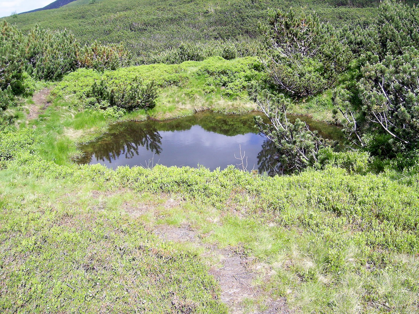 Troiśniak Niżni kilka metrów od szlaku na Świnicką Przełęcz